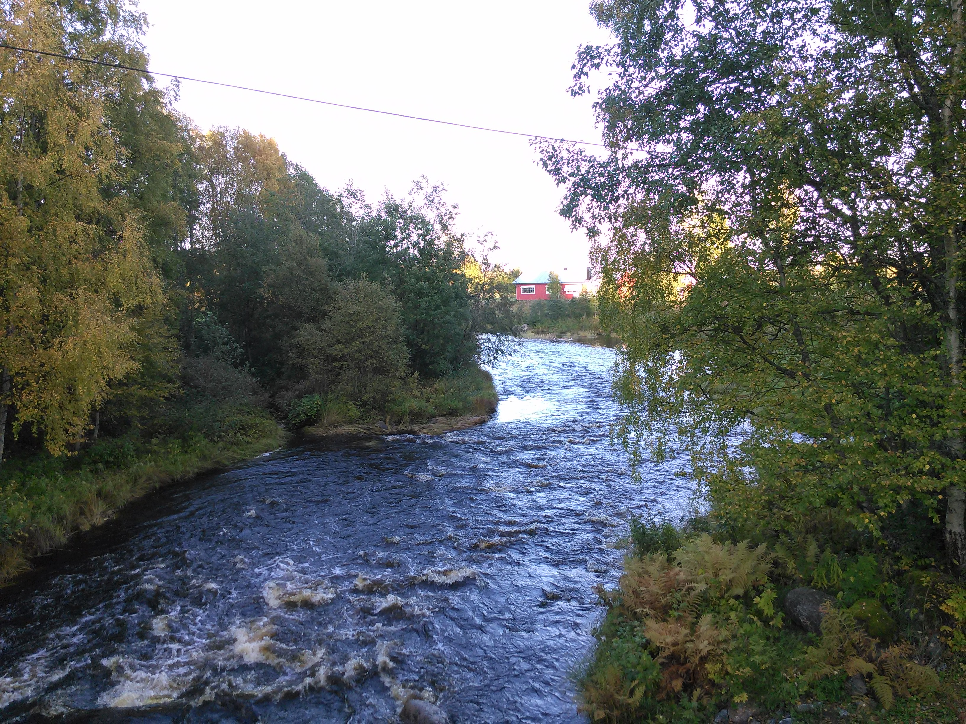 Tavelån utanför Umeå.